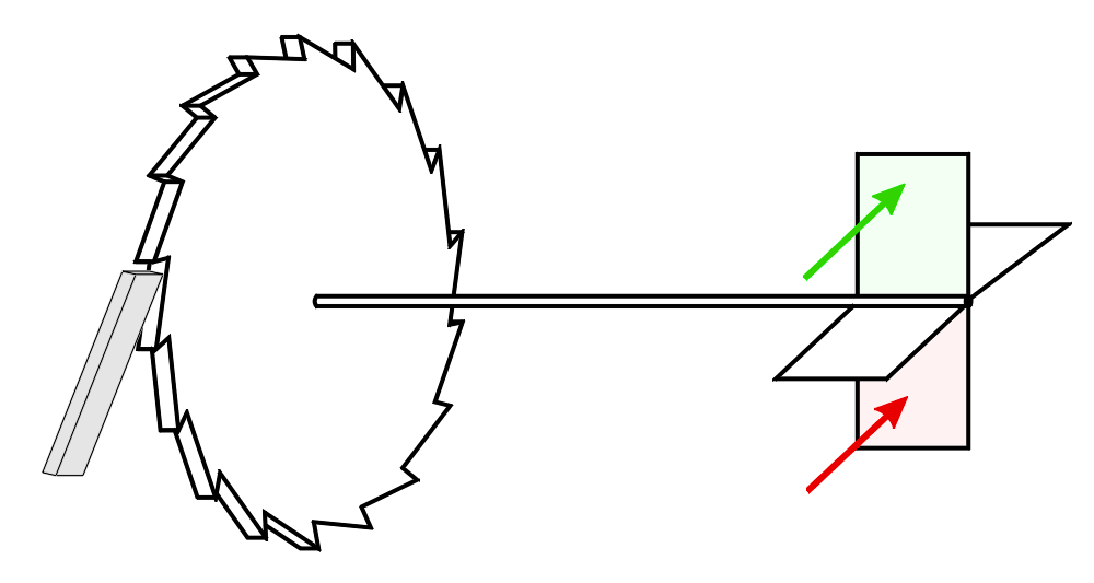 Gedankenexperiment einer molekularen Ratsche nach Feynman